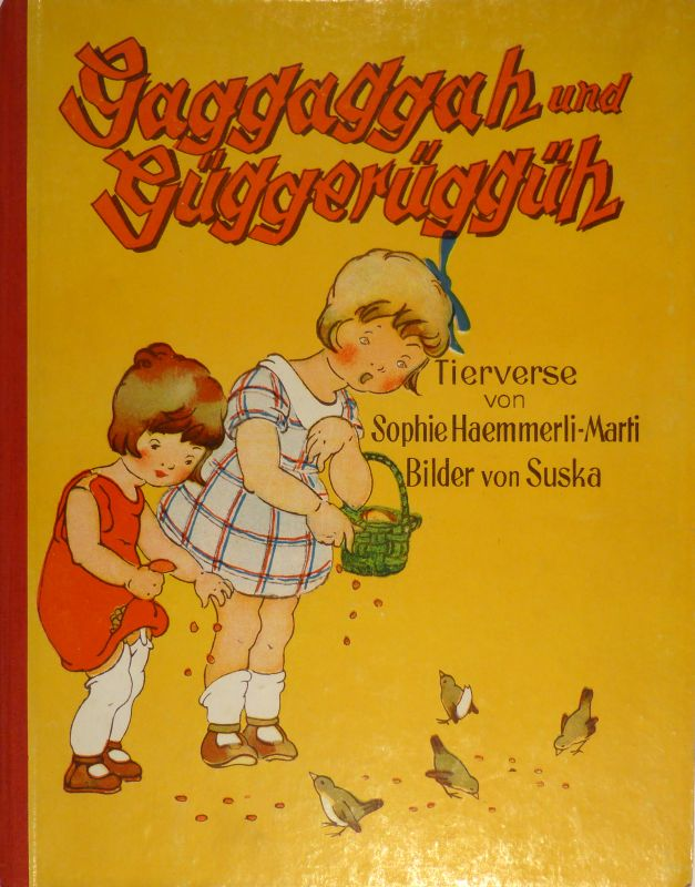 Annie Engelmann (Suska); Sophie Haemmerli-Marti: Gaggaggah und Güggerüggüh. Tierverse von Sophie Haemmerli-Marti. Bilder von Suska. Basel, Benno Schwabe o.J. (1928).